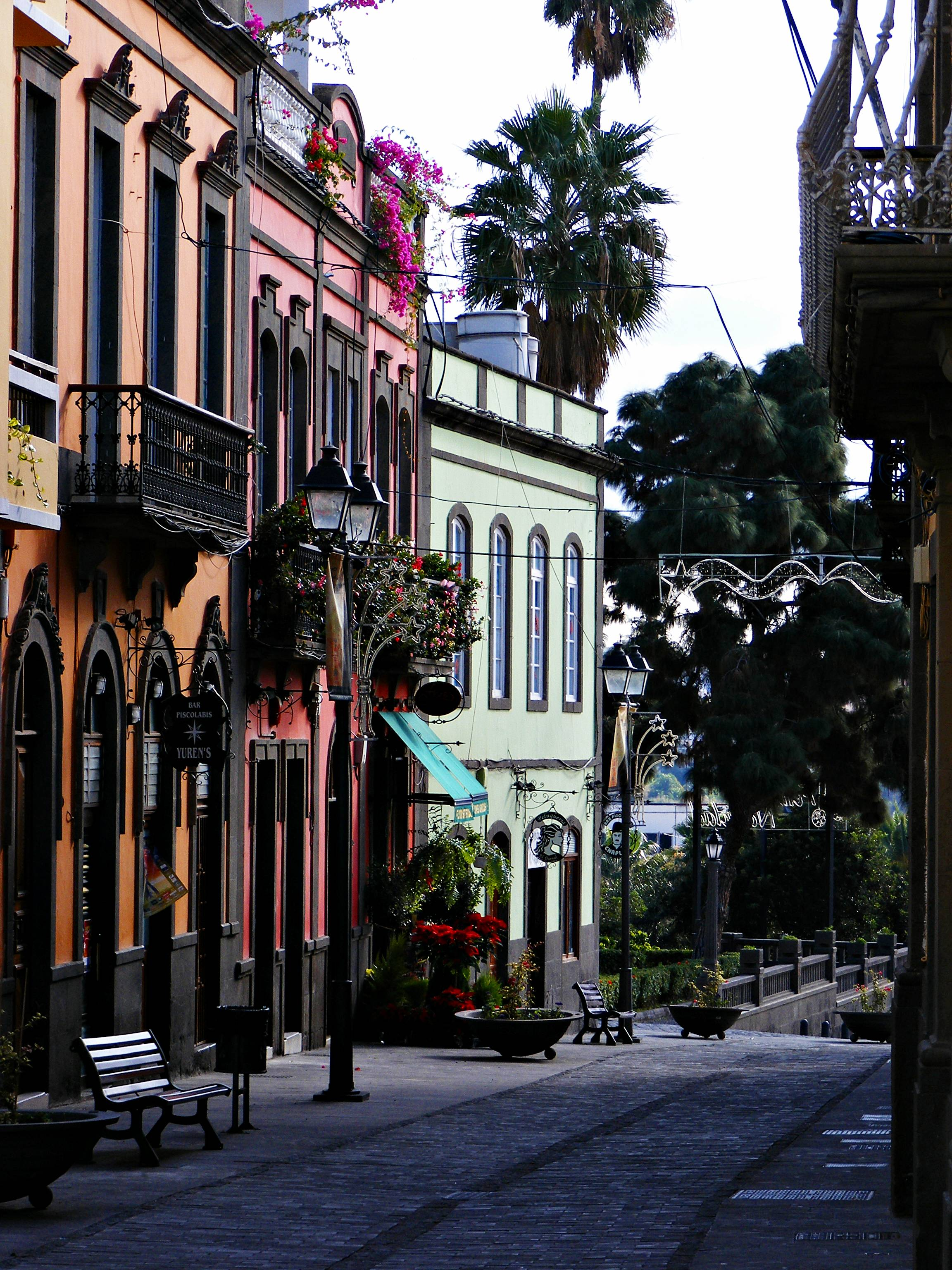 La calle León y Castillo, en Arucas, refleja el estilo arquitectónica de esta pequeña ciudad del norte de Gran Canaria.